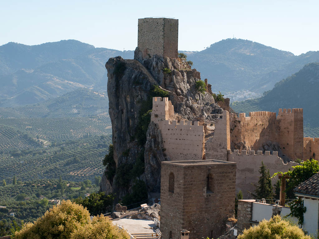 Castillo de la Iruela, Jaén, España.